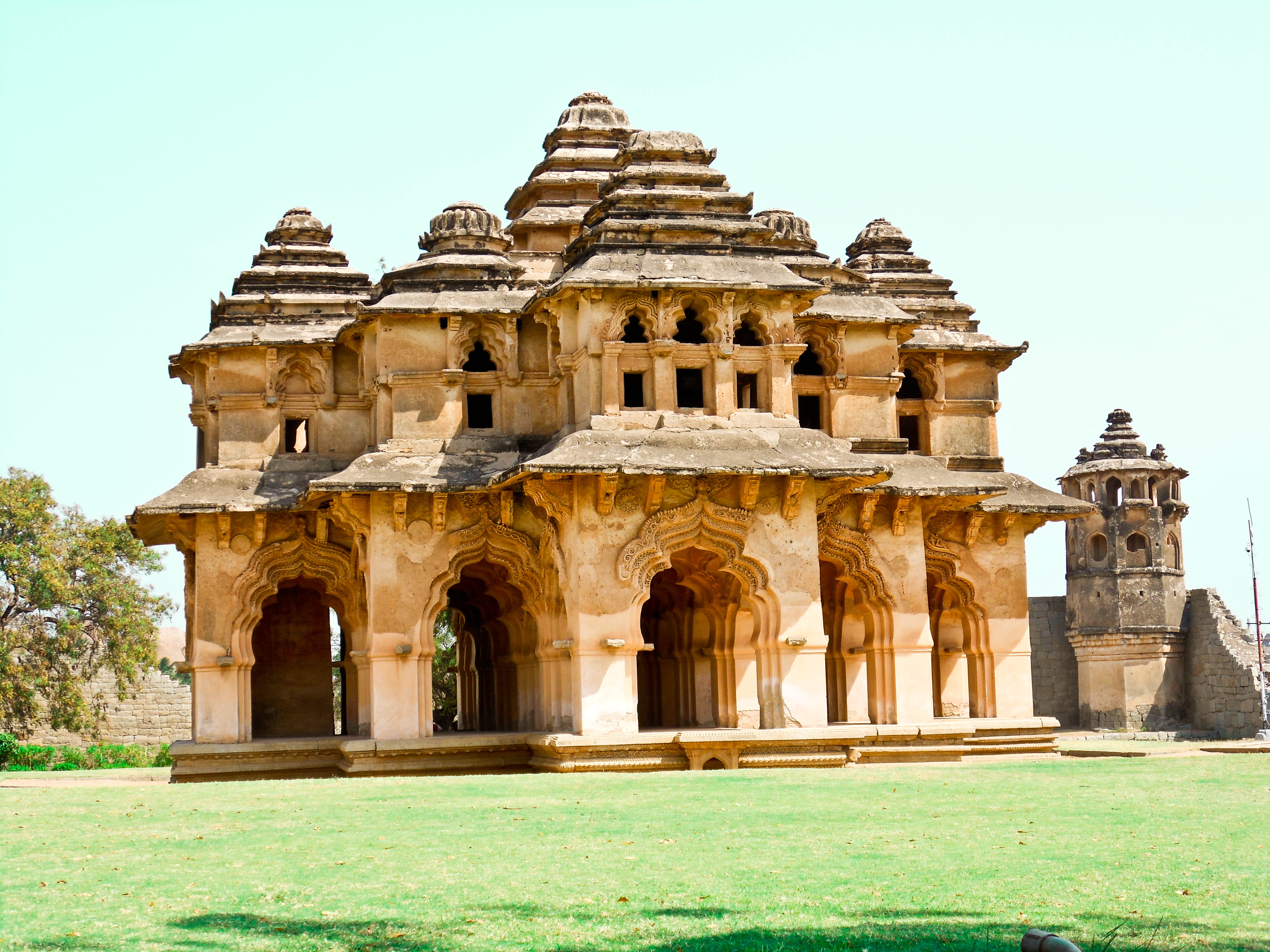 Indischer Tempel